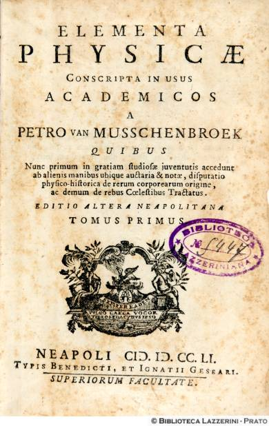 Elementa Physicae conscripta in usus academicos, Neapoli 1751